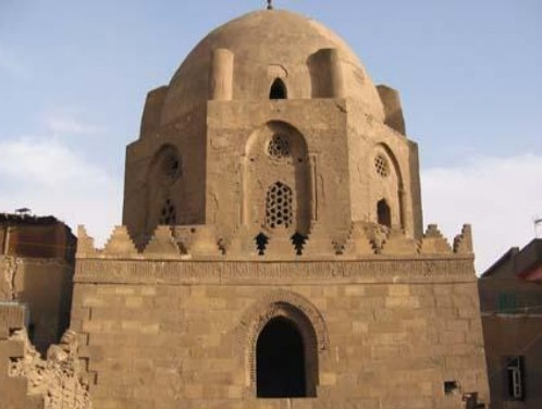 Tumba de Al-Ashraf Jalil en El Cairo.